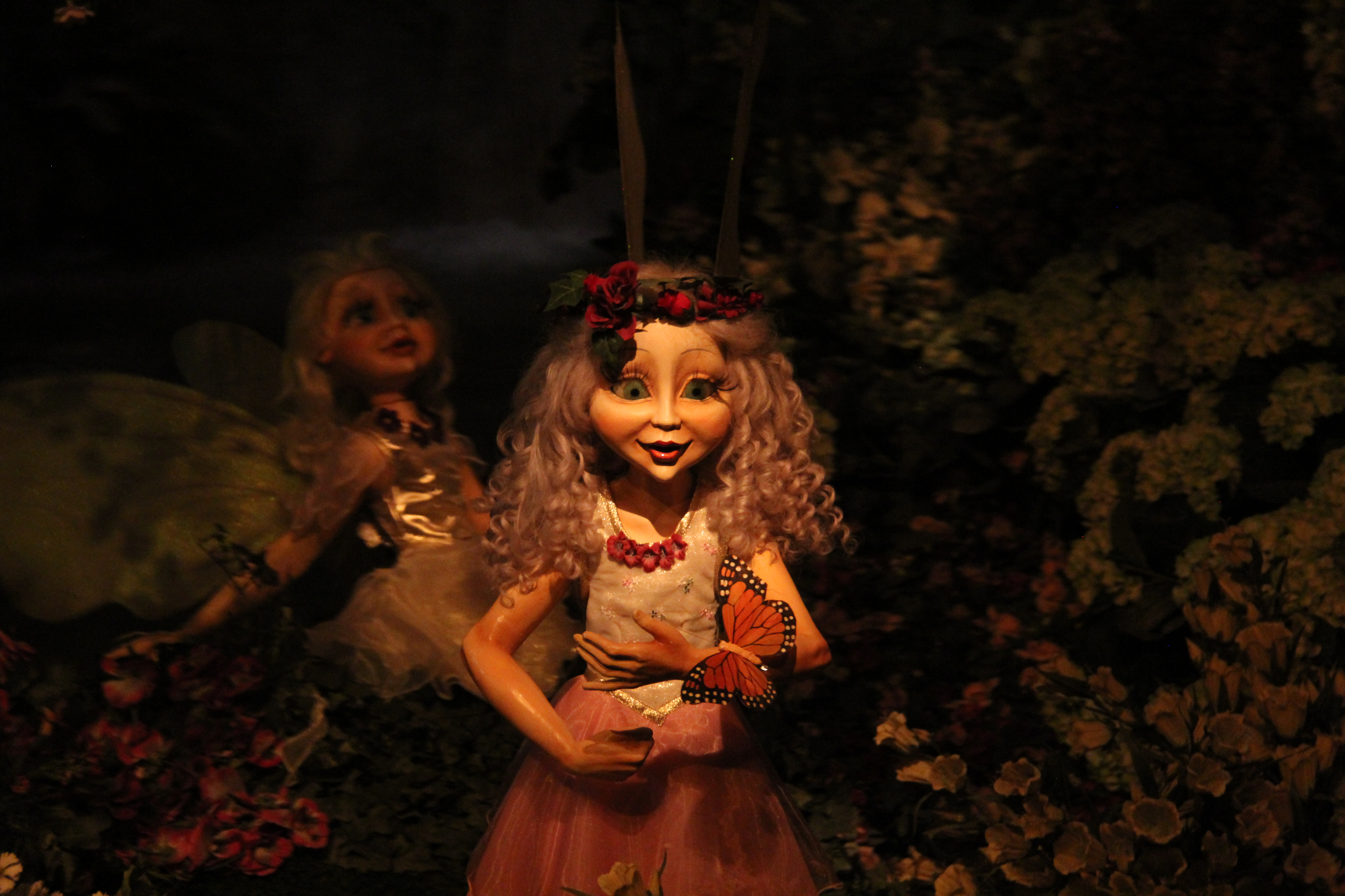 Een elfje met een vlinder op haar arm